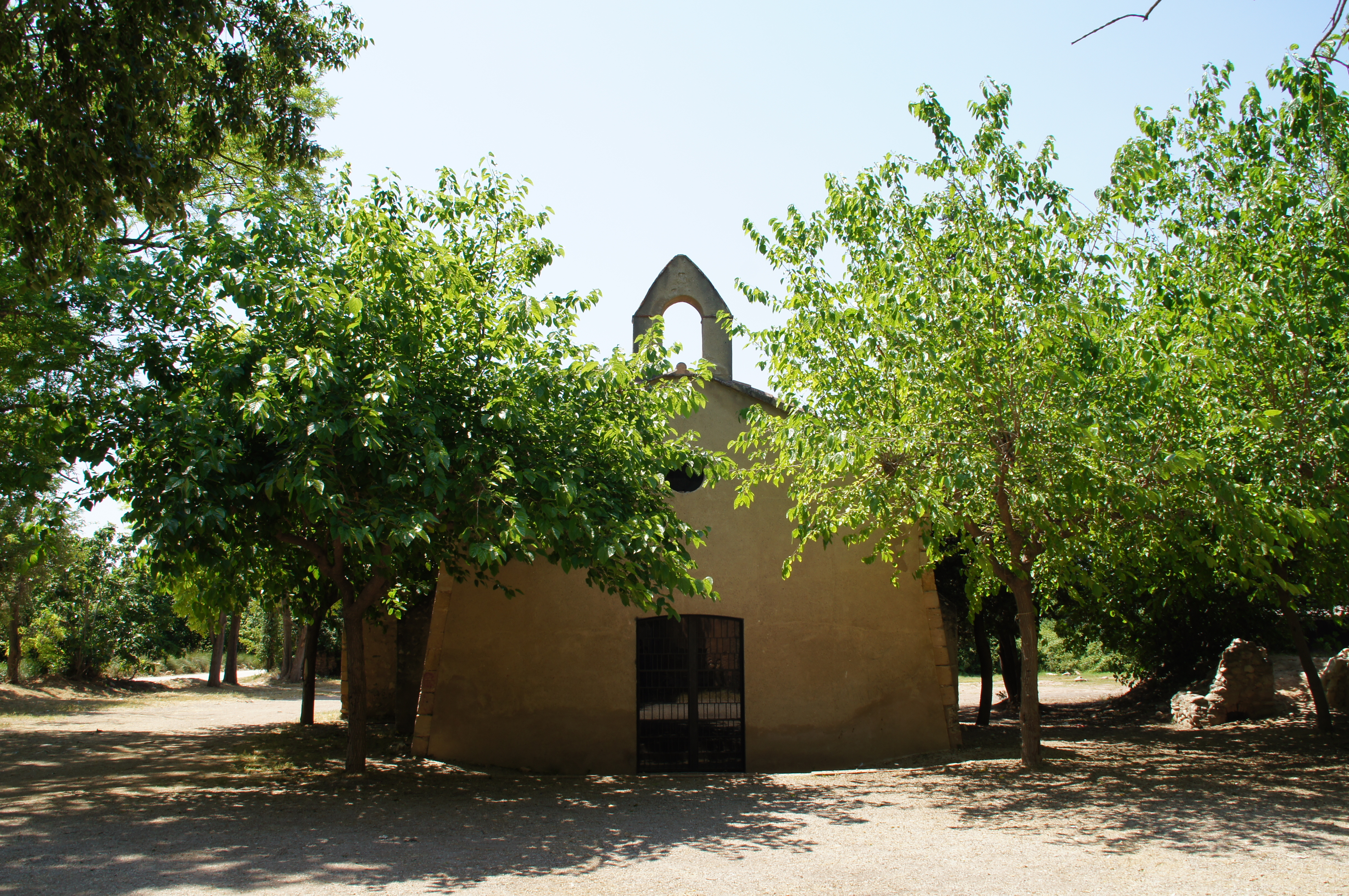 Poblat la Granja (el Morell)